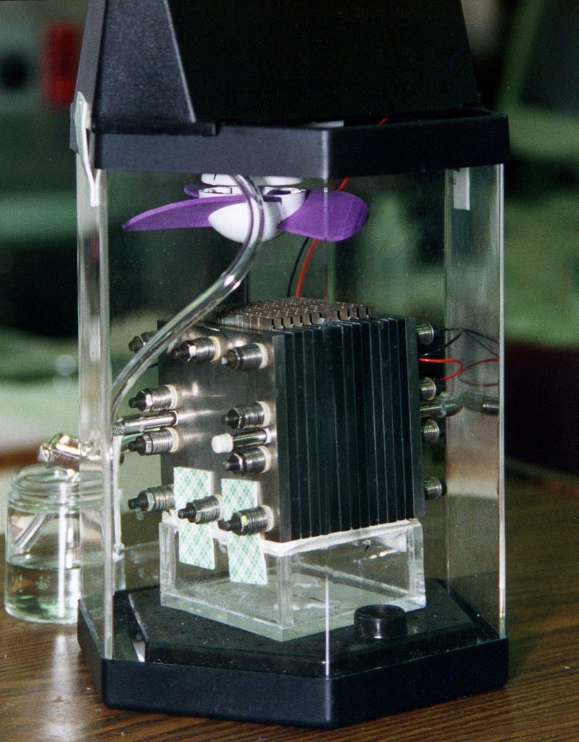 Methanol Fuel Cell from